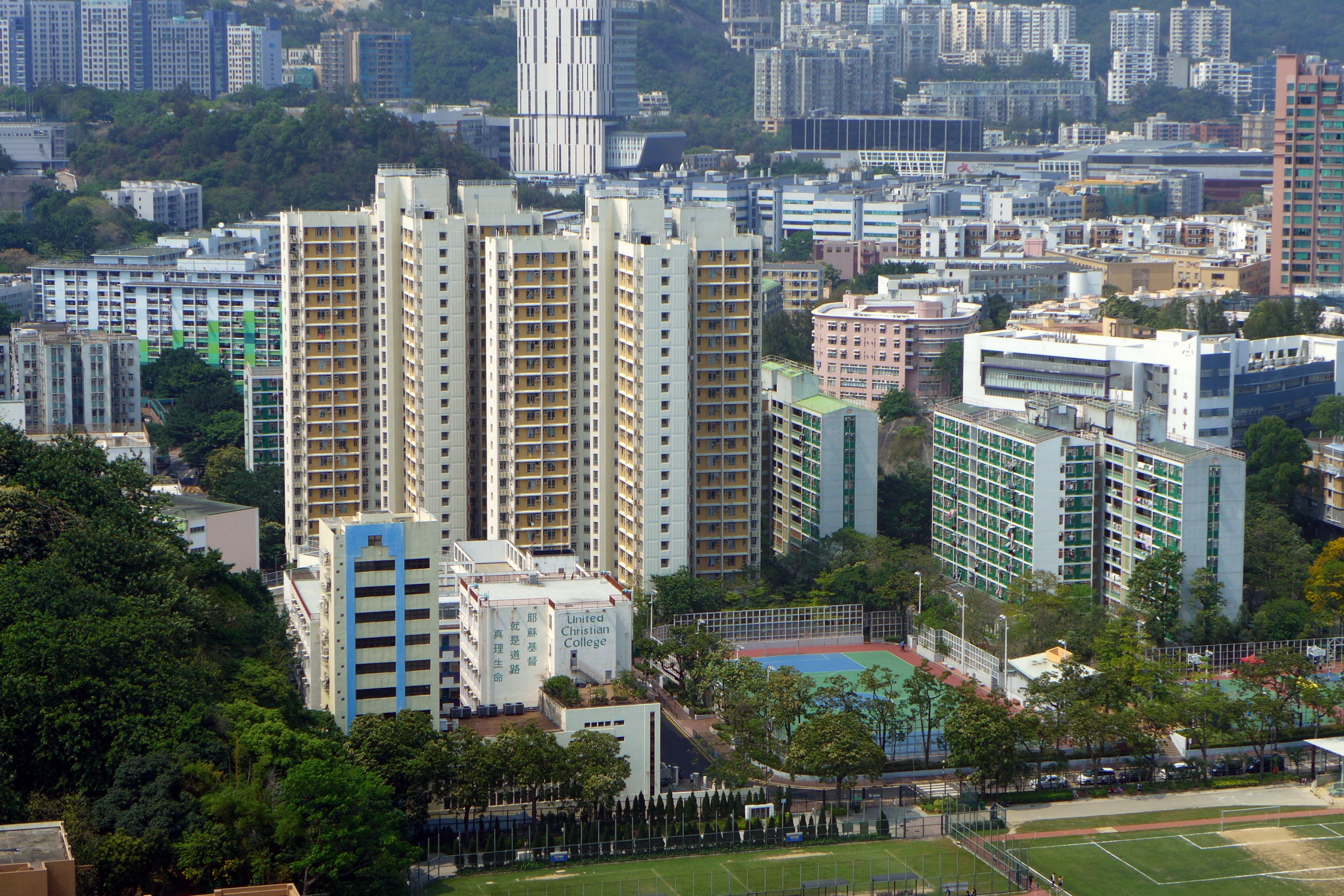 Tai Hang Tung Estate